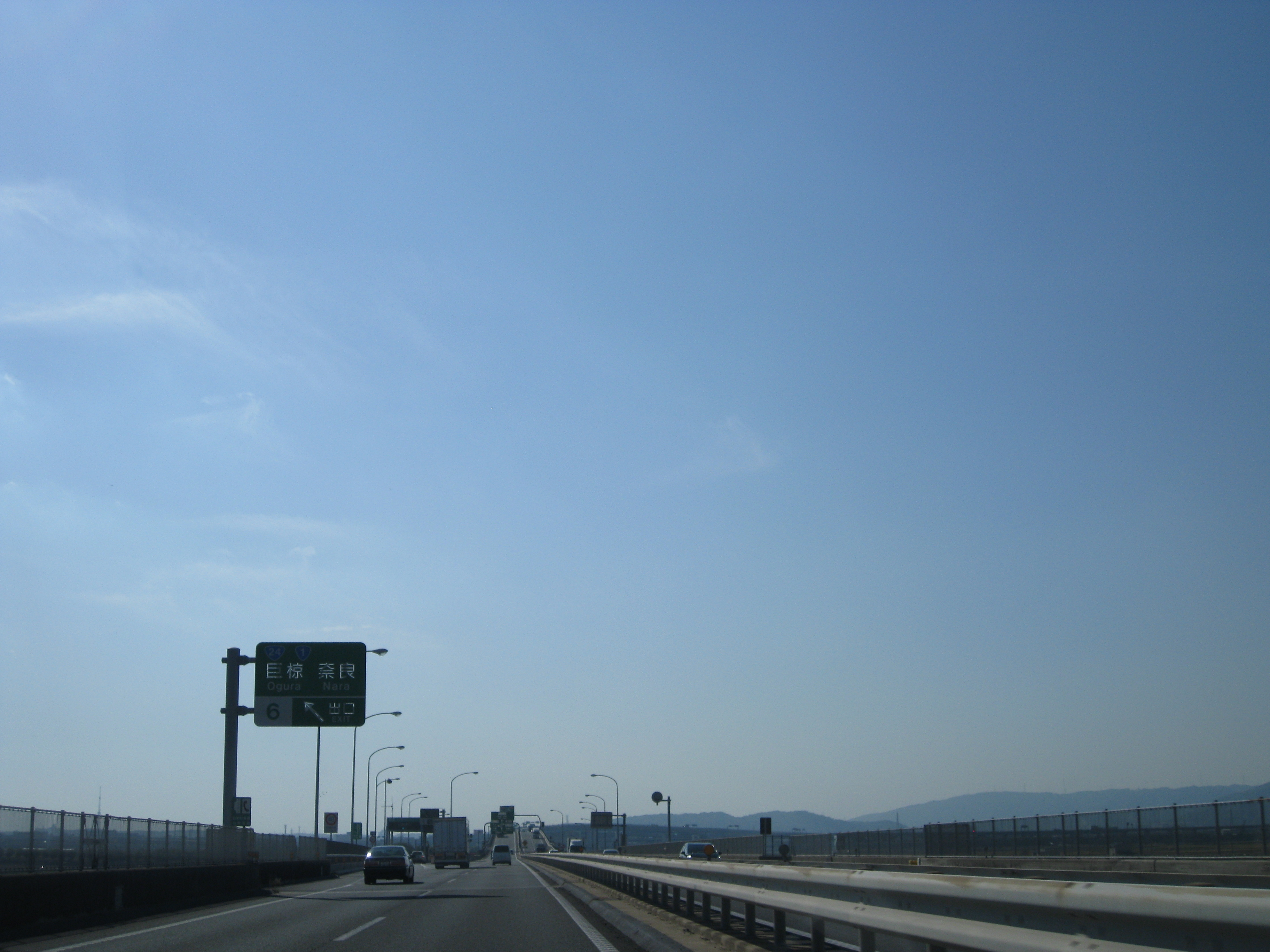 京滋バイパス下り 巨椋IC付近